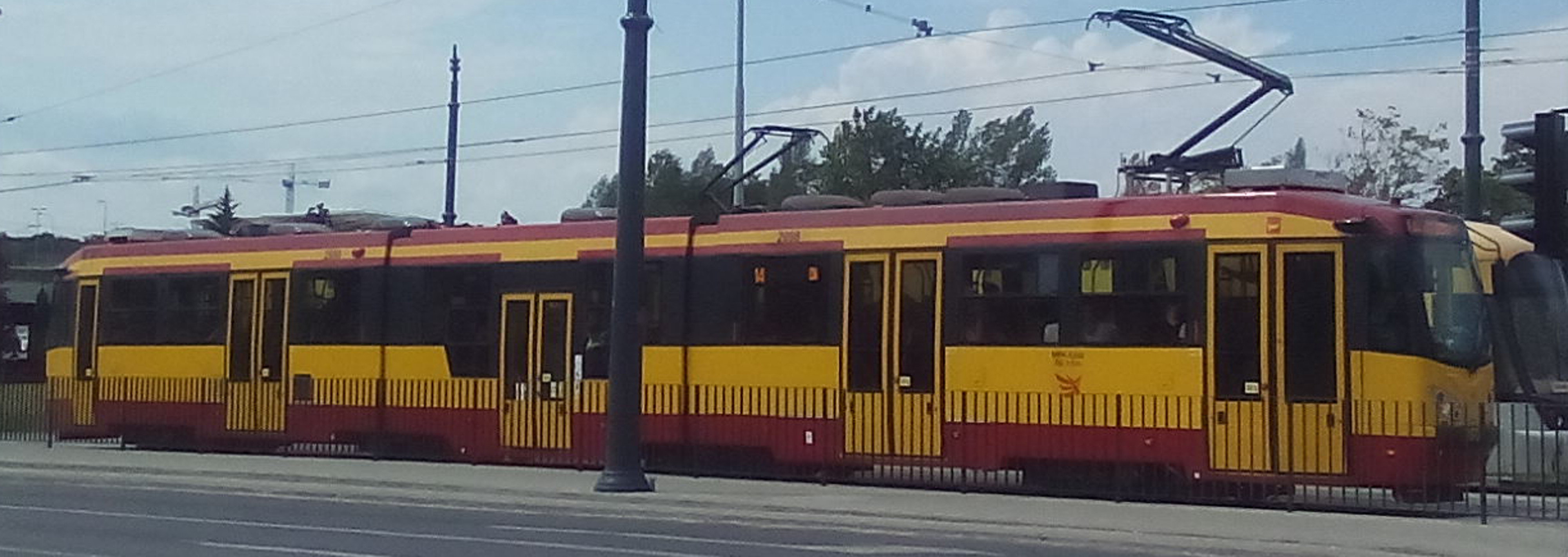 Tramwaj Düwag M8CN w barwach MPK Łódź (linia 14) na skrzyżowaniu al. Włókniarzy i Bandurskiego (w sąsiedztwie przystanku pod stacją kolejową Łódź Kaliska)